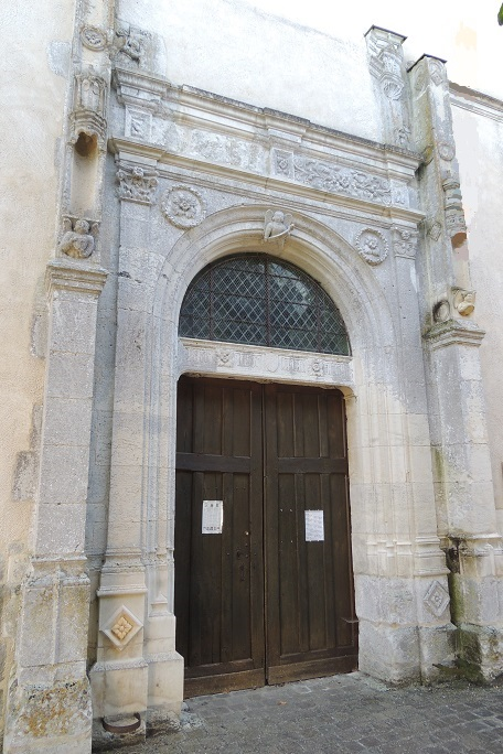 Église Saint-Pierre, portail de 1545 avec une grande porte surmontée d'un fin linteau sous un fronton à voussure de plein cintre évidé et avec sculptures en formes de têtes des 2 côtés et un ange à l'endroit de la clef de voute